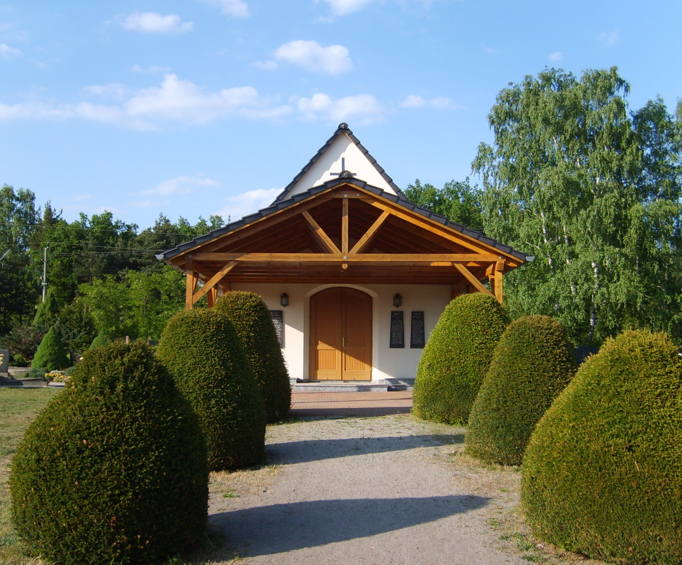 Friedhofshalle_Haida_Roederland